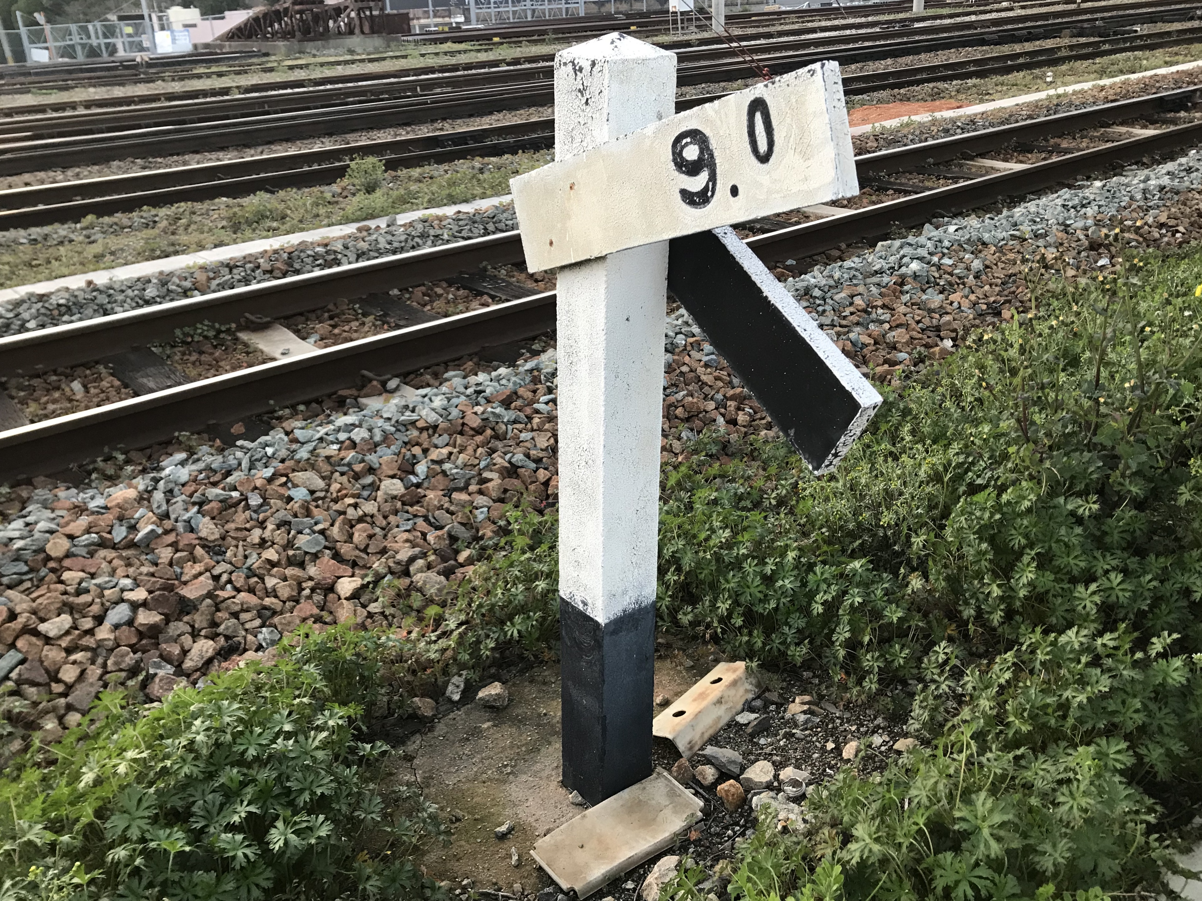 香椎駅北側の香椎線勾配標